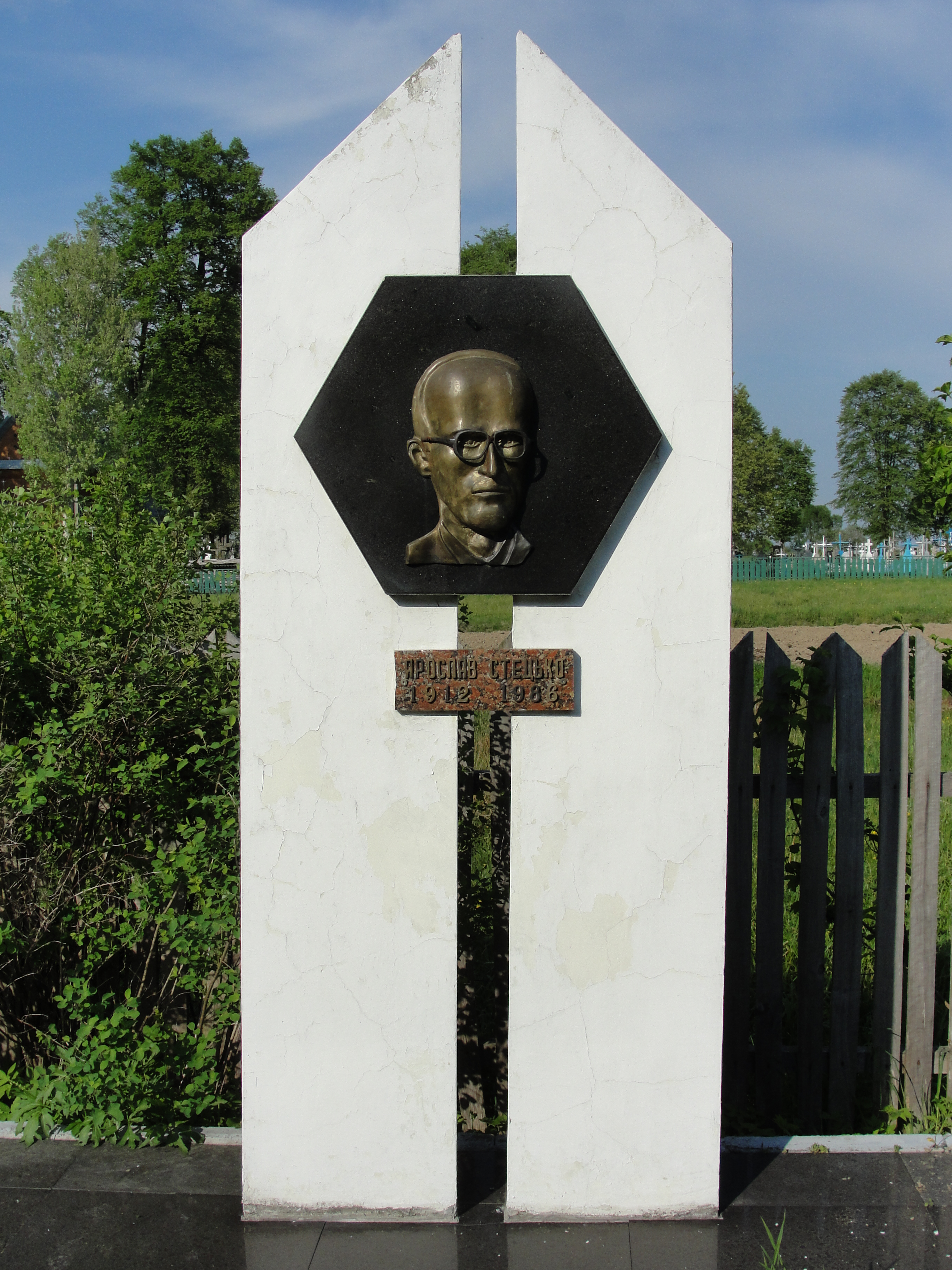 Меморіальна табличка Я.Стецьку у с.Воля-Задеревацька